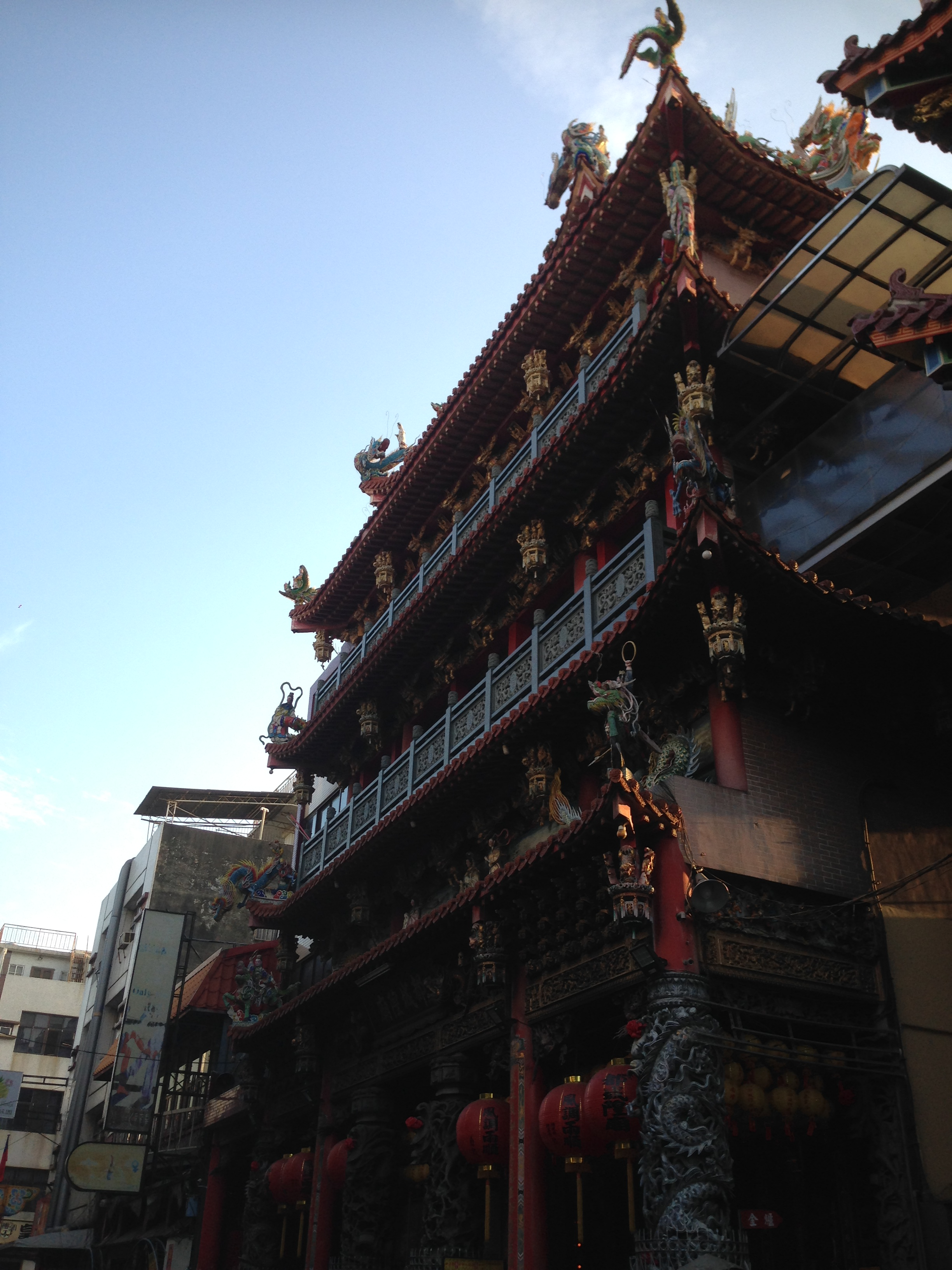 中文（台灣）: 屏東市都城隍廟